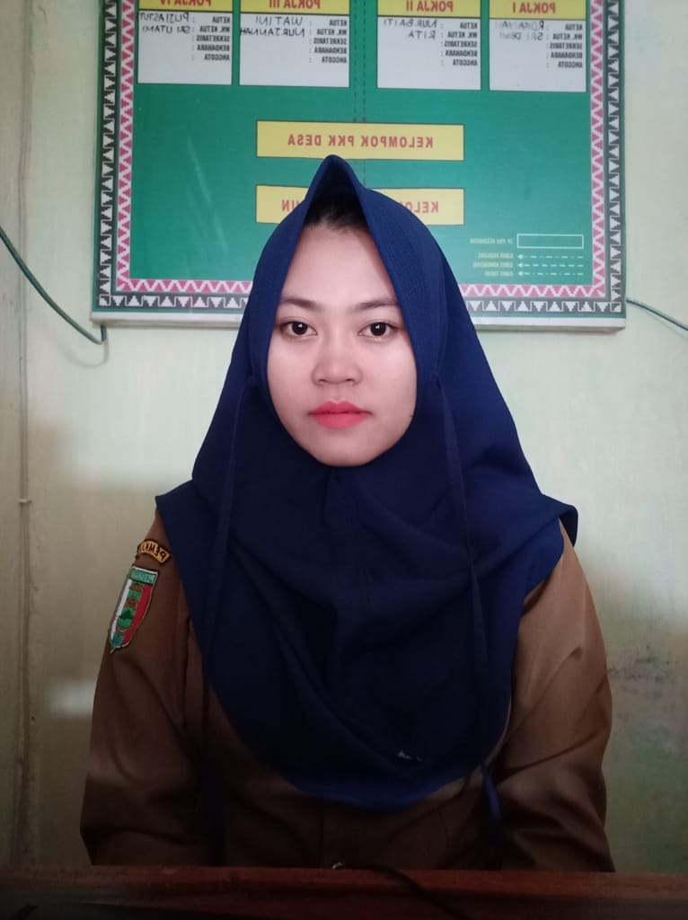 kasi kesra